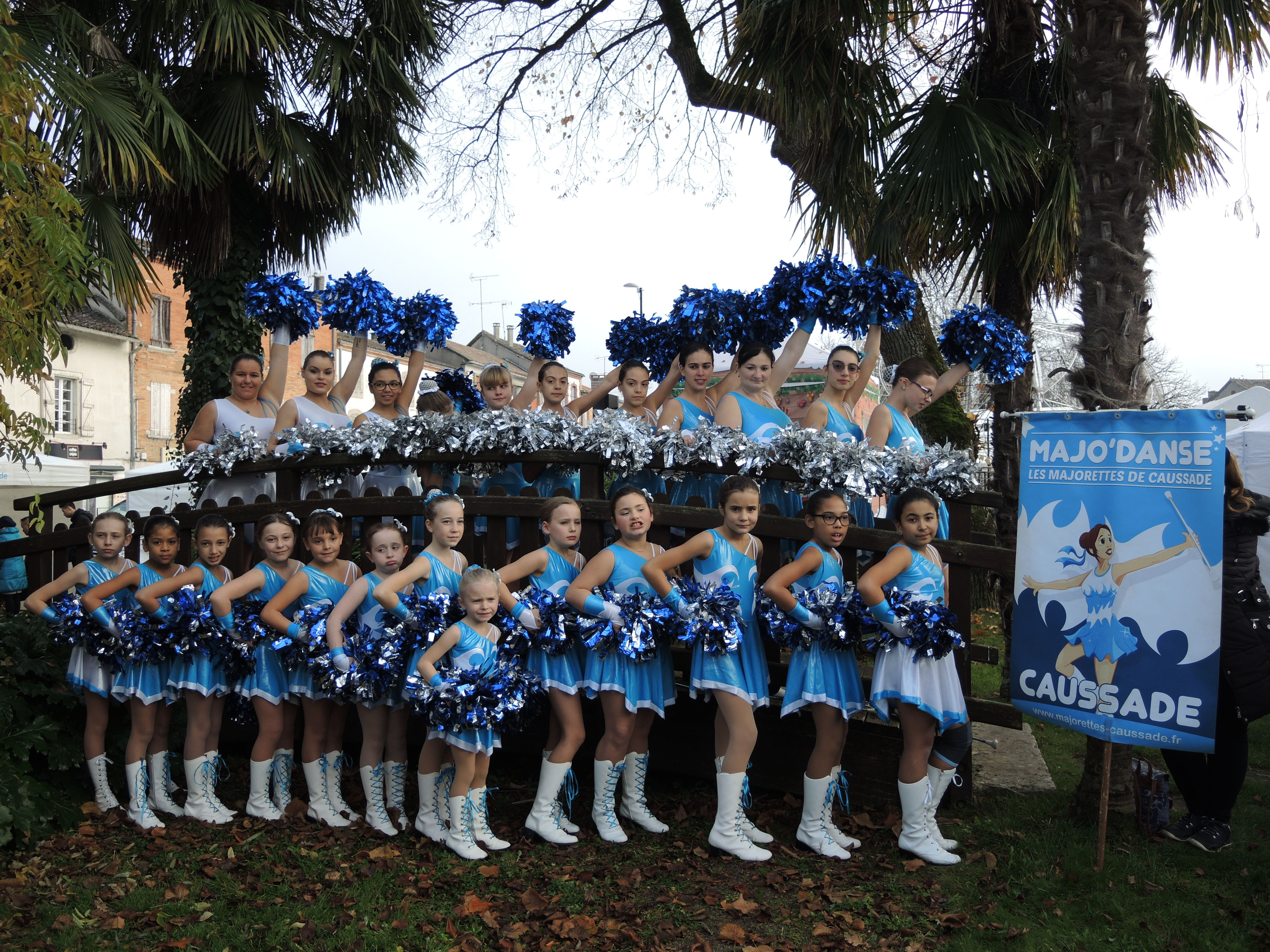 Pour vos festivités, carnavals, animations, majo'danse de Caussade, majorettes et danse avec divers accessoires